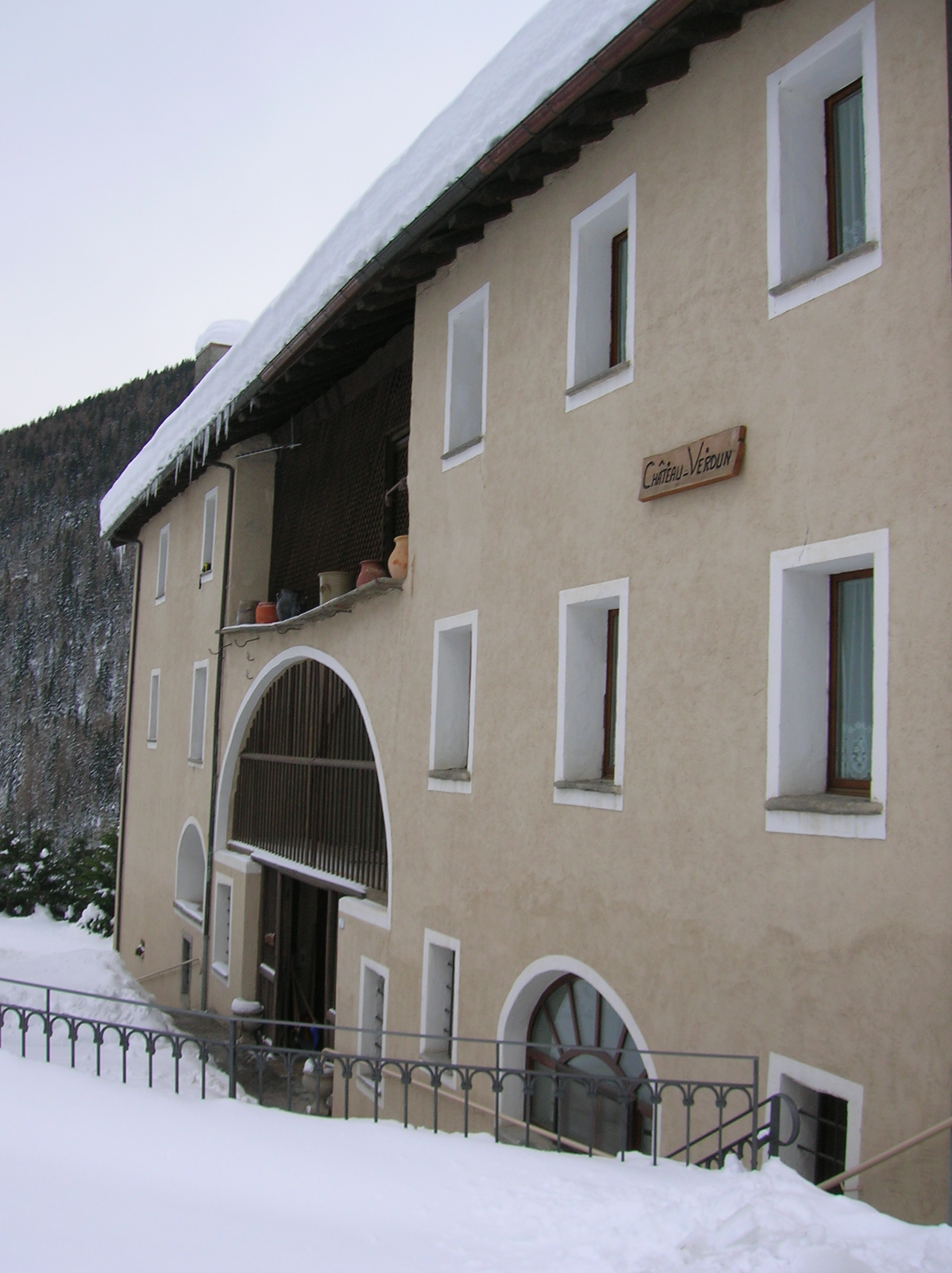 Esterno della facciata Château Verdun in inverno, Saint-Oyen, Valle d'Aosta, Italia.